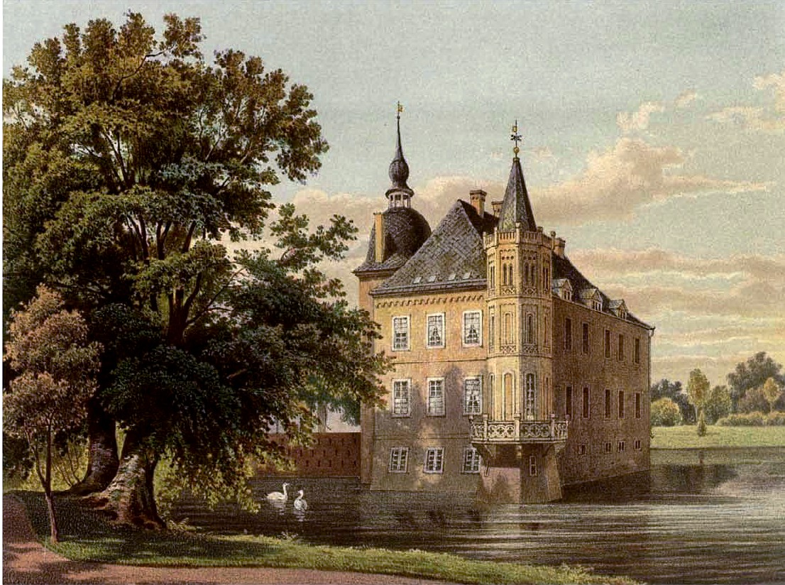 Haus Heeren, Kreis Hamm